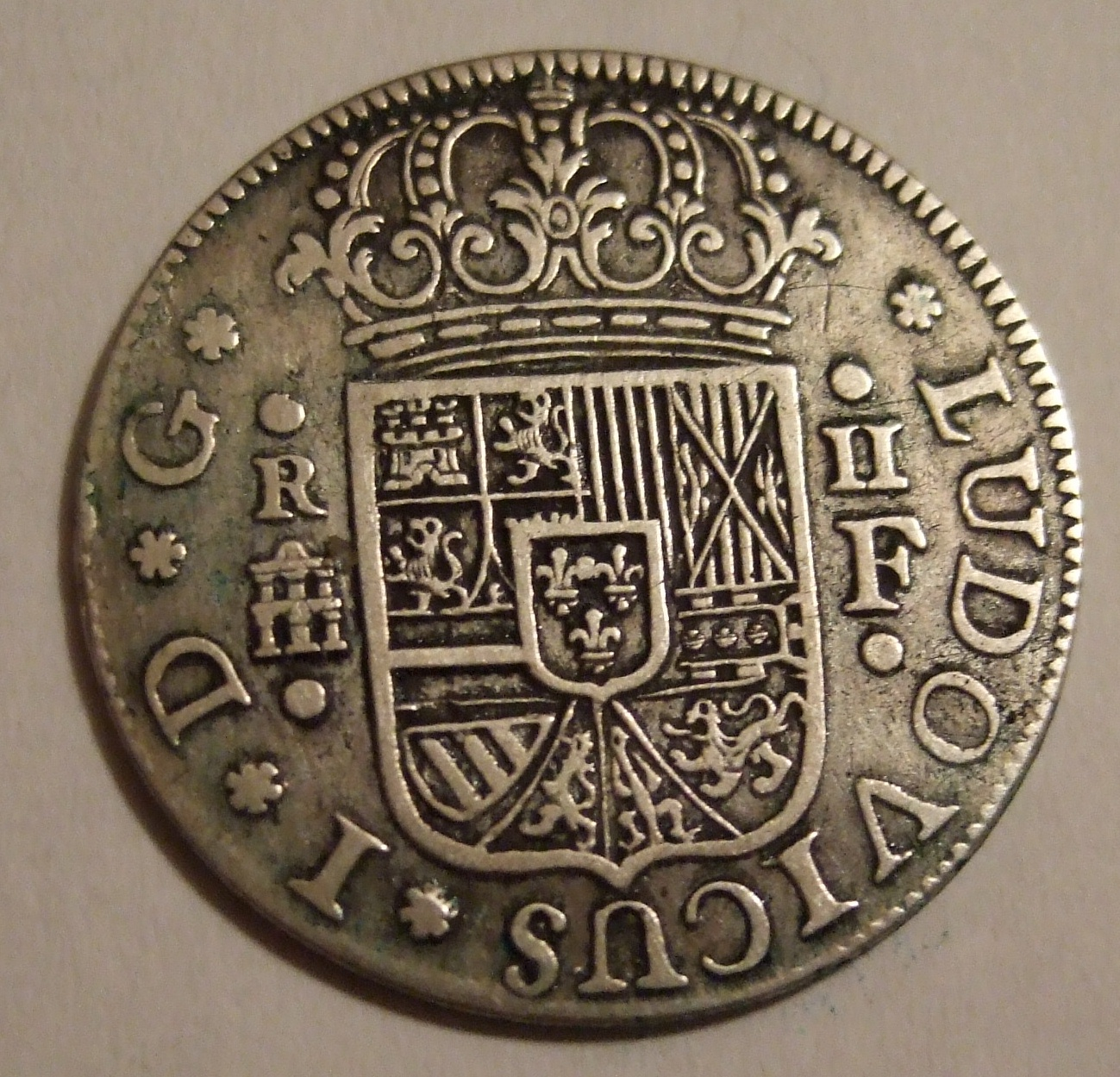 SPAIN, LUIS I, 1724 ---2 REALES a